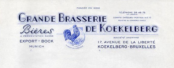 En-tête de lettre de la Grande Brasserie de Koekelberg. Vers 1935.